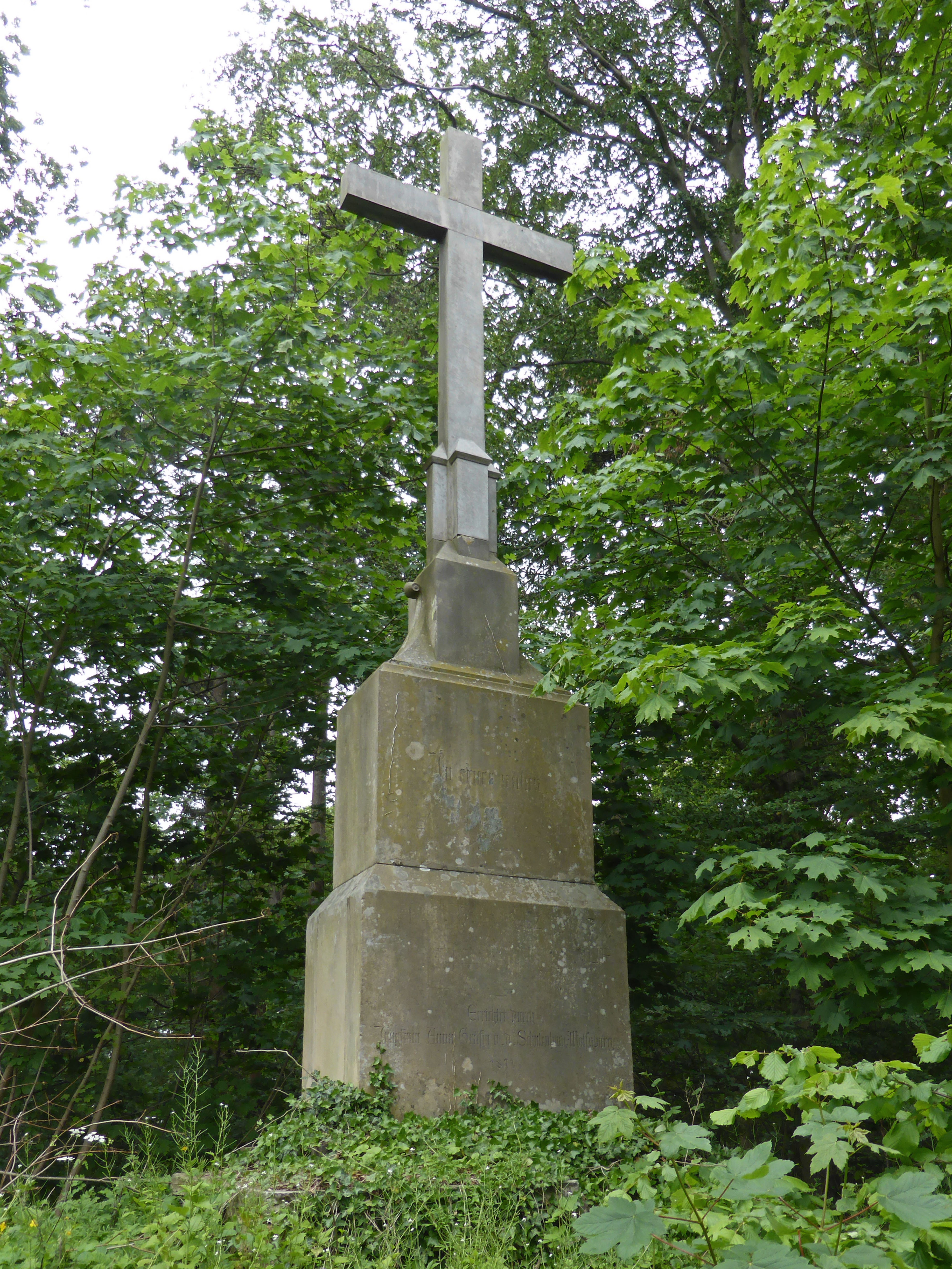 Kreuz auf dem Friedhof derer von der Schulenburg am Eiskuhlenberg bei Beetzendorf, errichtet durch Anna Gräfin von der Schulenburg-Wolfsburg (Tochter von Friedrich Gebhard Werner Graf von der Schulenburg-Wolfsburg, * 7. Juni 1826, Konventualin im Kloster Marienberg (Helmstedt), † 26. November 1902 in Braunschweig, bestattet in Rothenfelde) im Jahre 1871.